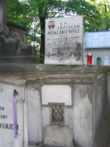 Zdizsław Maklakiewicz's monument (Powązki Cemetery)